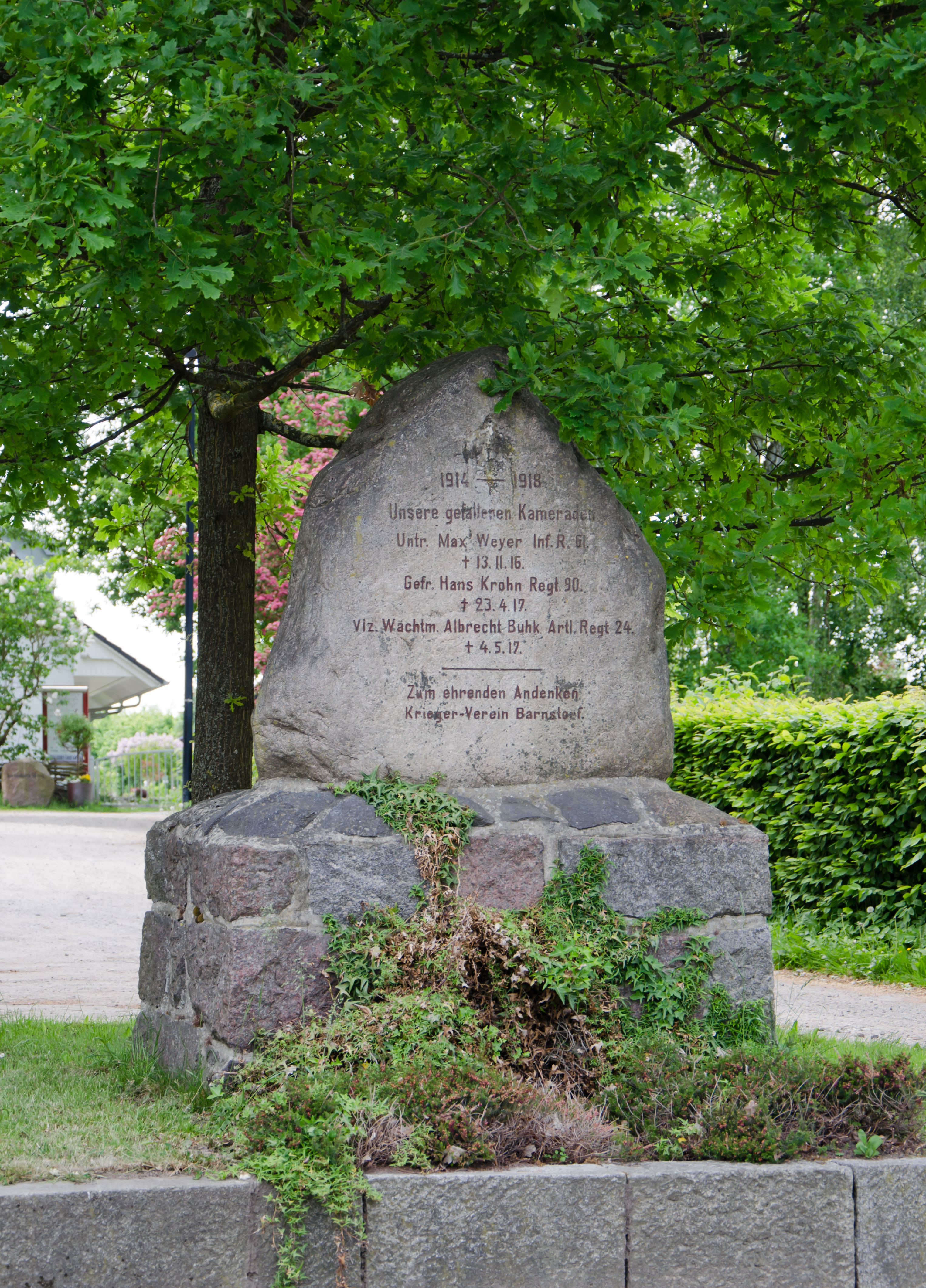 Kriegerdenkmal in Rostock-Biestow